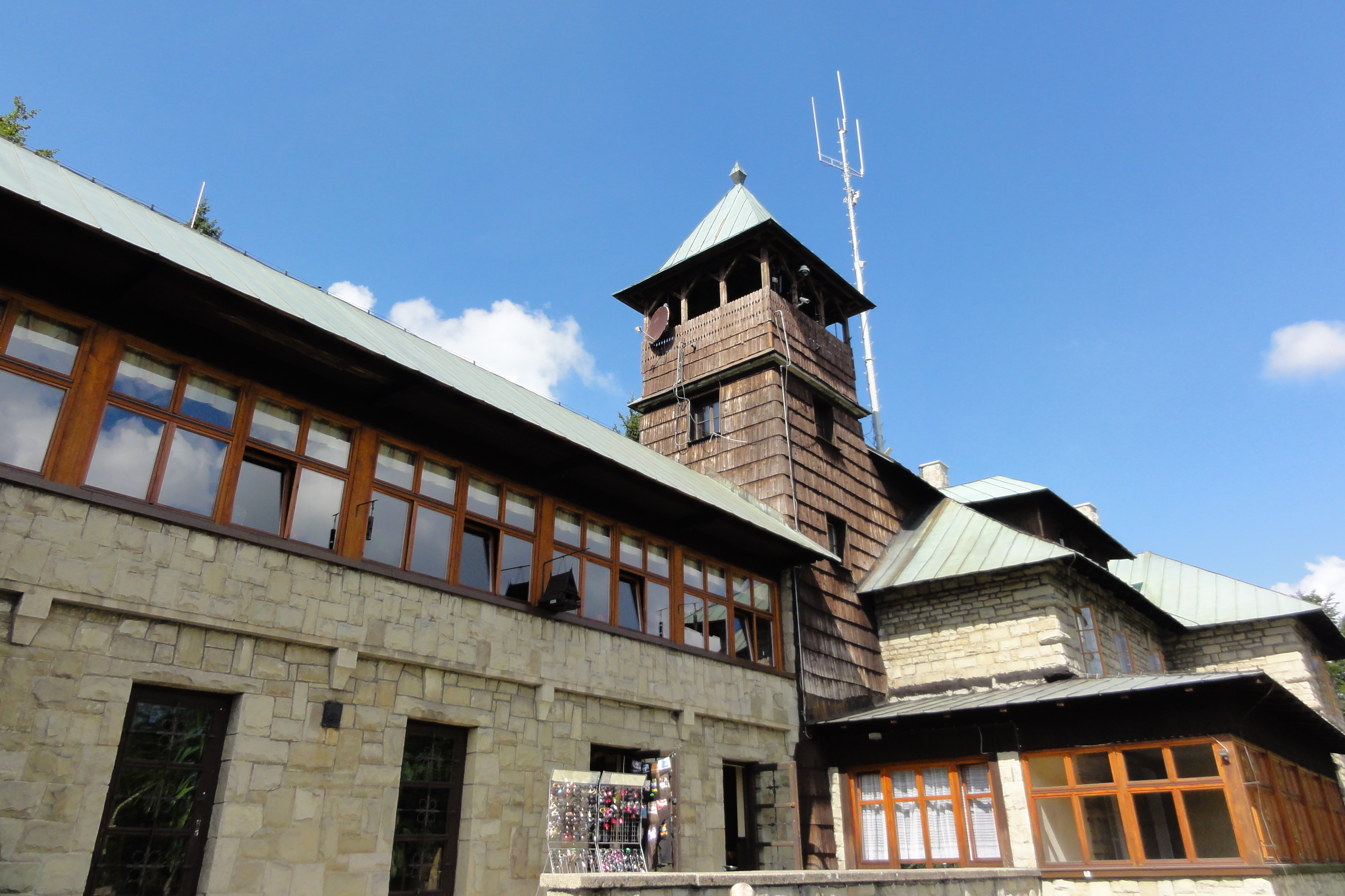 Bielsko-Biała, Shelter "Szyndzielnia"